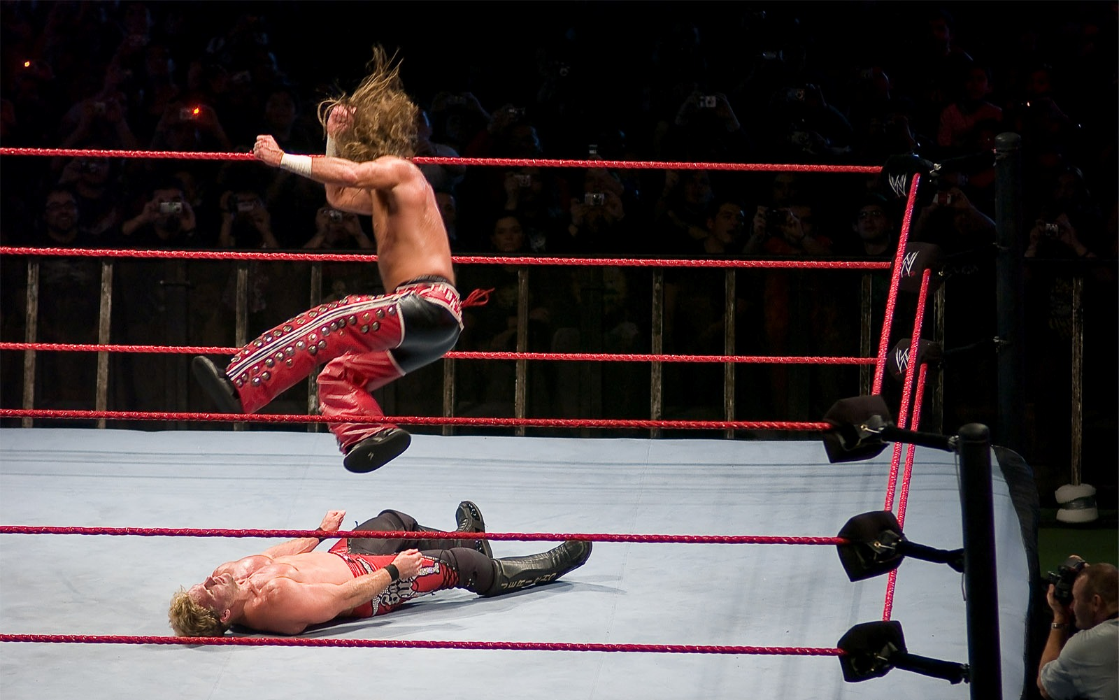 Presentación de la WWE en Santiago de Chile... al más puro estilo "Titanes del Ring" Foto: Alvaro Pruneda No use esta foto sin mi autorización. Don´t use this photo without my permission.